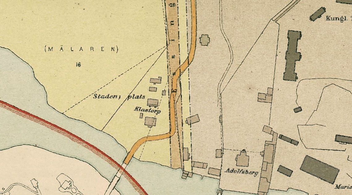 Del av karta över Stockholm (Kungsholmen) visande Klastorp